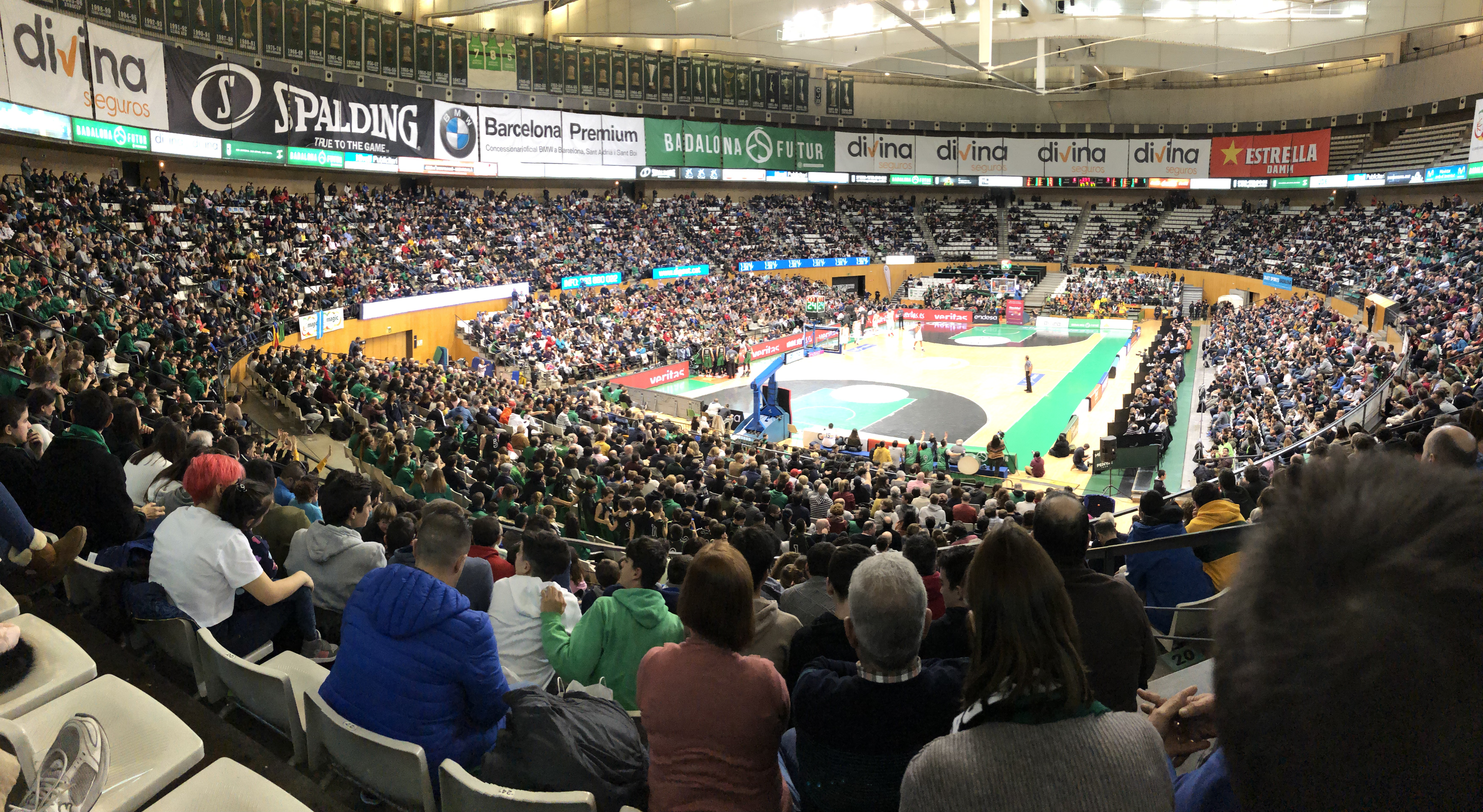 Vista del Palau Olímpic de Badalona en partit de lliga entre el Divina Seguros Joventut i el Kirolbet Baskonia (jornada 16) amb 6.385 assistents.